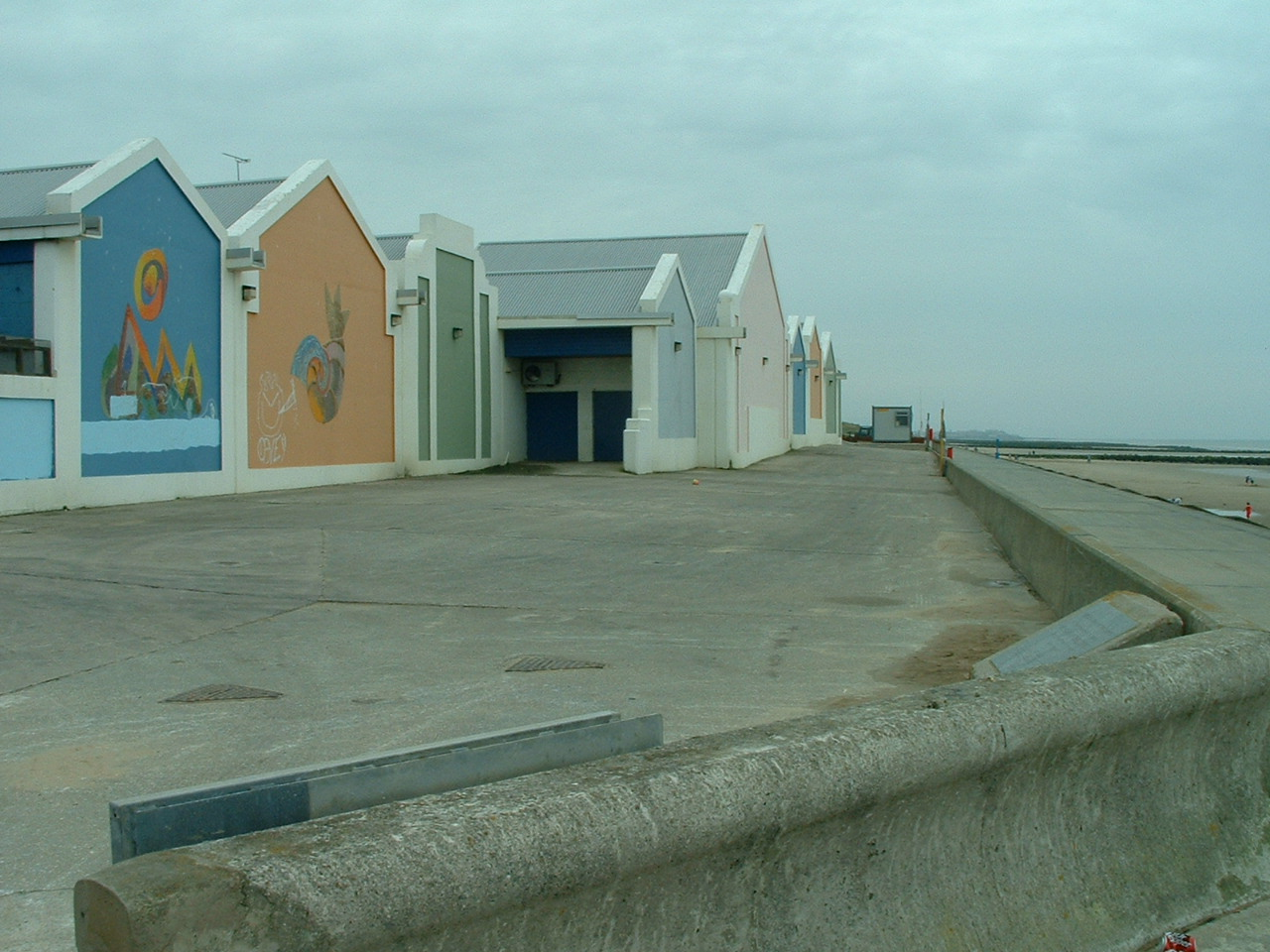 Eigen opname